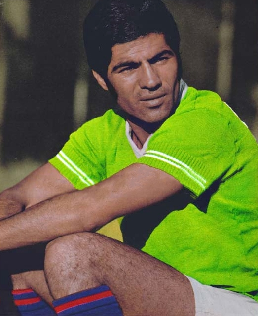 Ebrahim Ashtiani